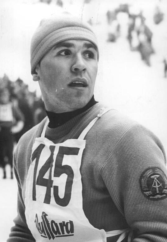 Zentralbild 22.2.1963 XIV. Deutsche Meisterschaften in den Nordischen Disziplinen Die XIV. Deutschen Meisterschaften in den Nordischen Disziplinen werden vom 20. bis 24. Februar 1963 in Klingenthal-Erzgebirge ausgetragen. UBz: Im Kombinationssprunglauf (21.2.63) belegte Roland Weisspflog (Sc Traktor Oberwiesenthal) auf der großen Vogtlandschanze in Mühlleithen den 4. Platz. (Gahlbeck)